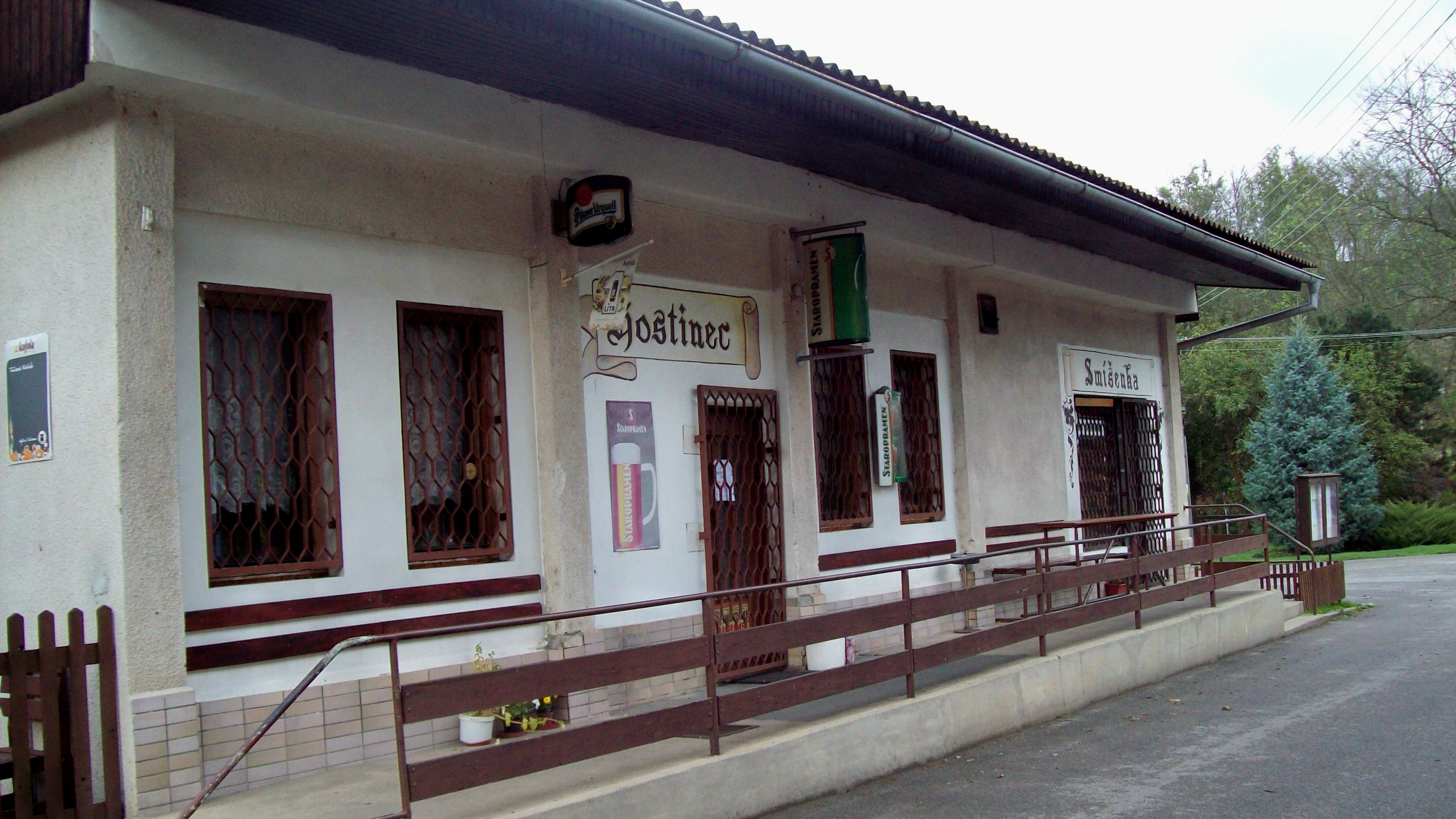 Hostinec, Lhotka u Mělníka